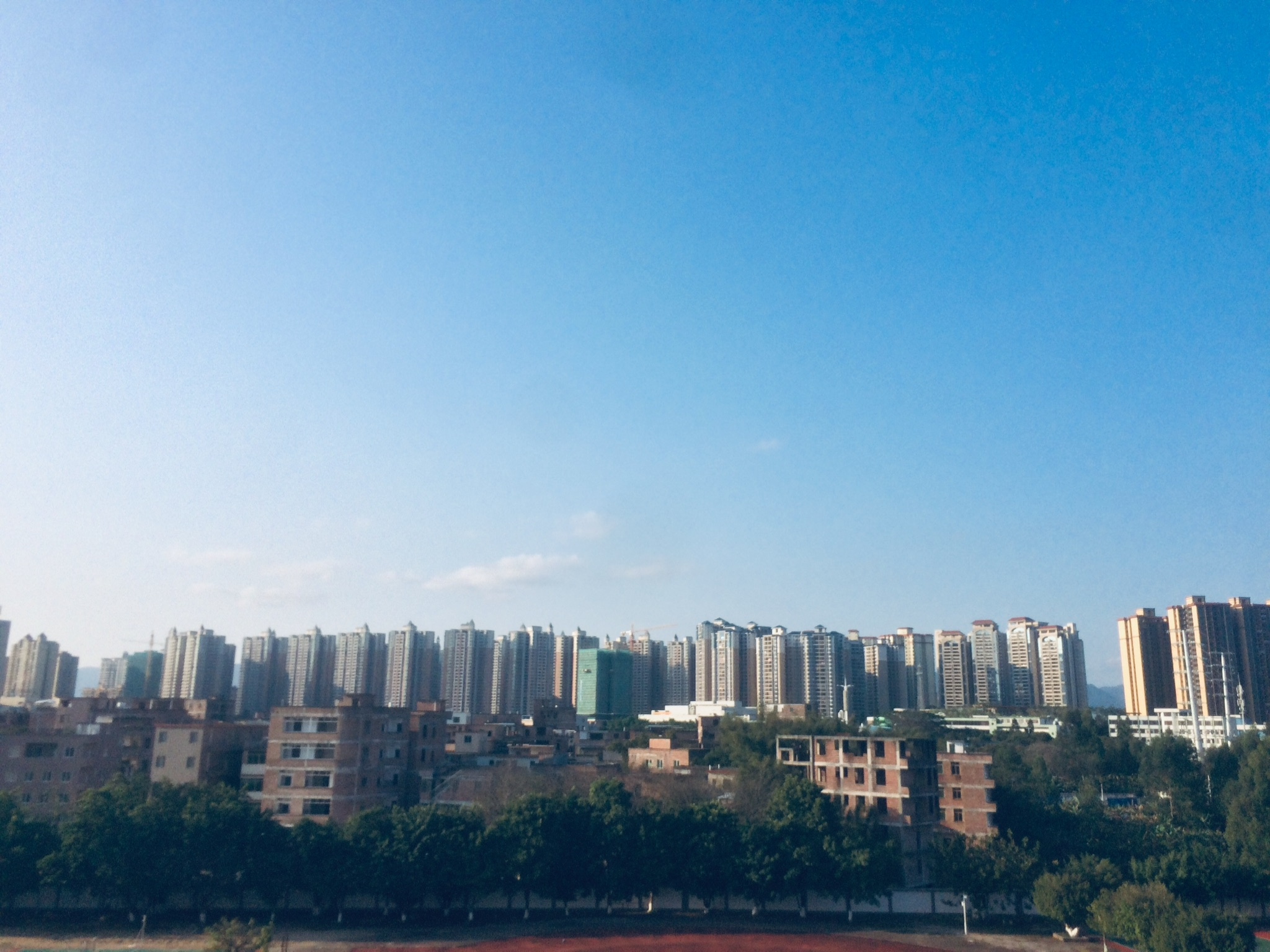 中文（中国大陆）: 摄于清远市华侨中学